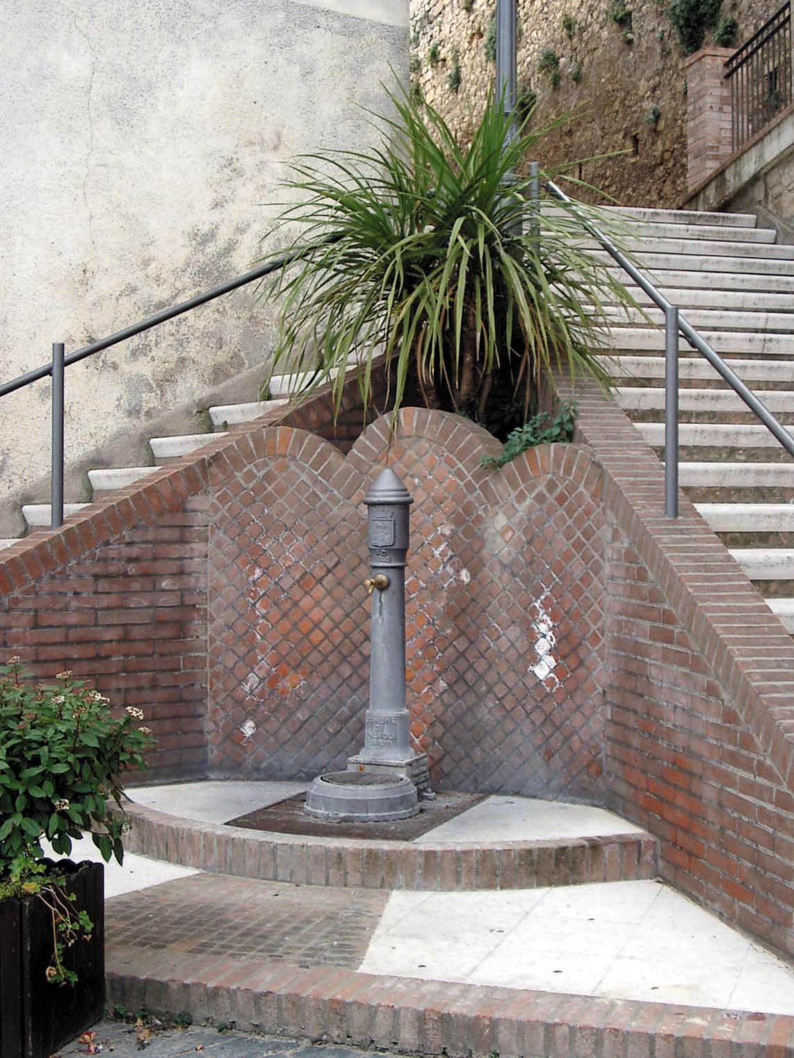 Fontanella copia della originaria utilizzata in occasione del primo acquedotto costruito in Palmoli, e oggetto di una famosa canzone